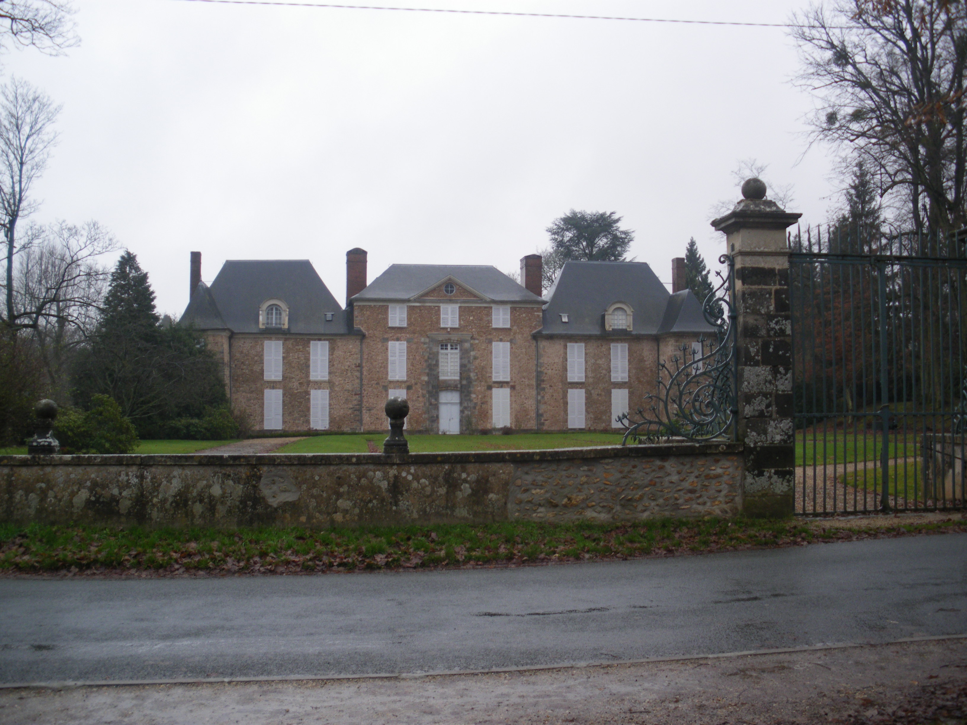 Chateau Forges les Bains